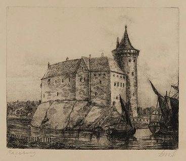 Schjerfbeck Magnuksen piirrustus Raaseporin linnasta 1500-luvulla.